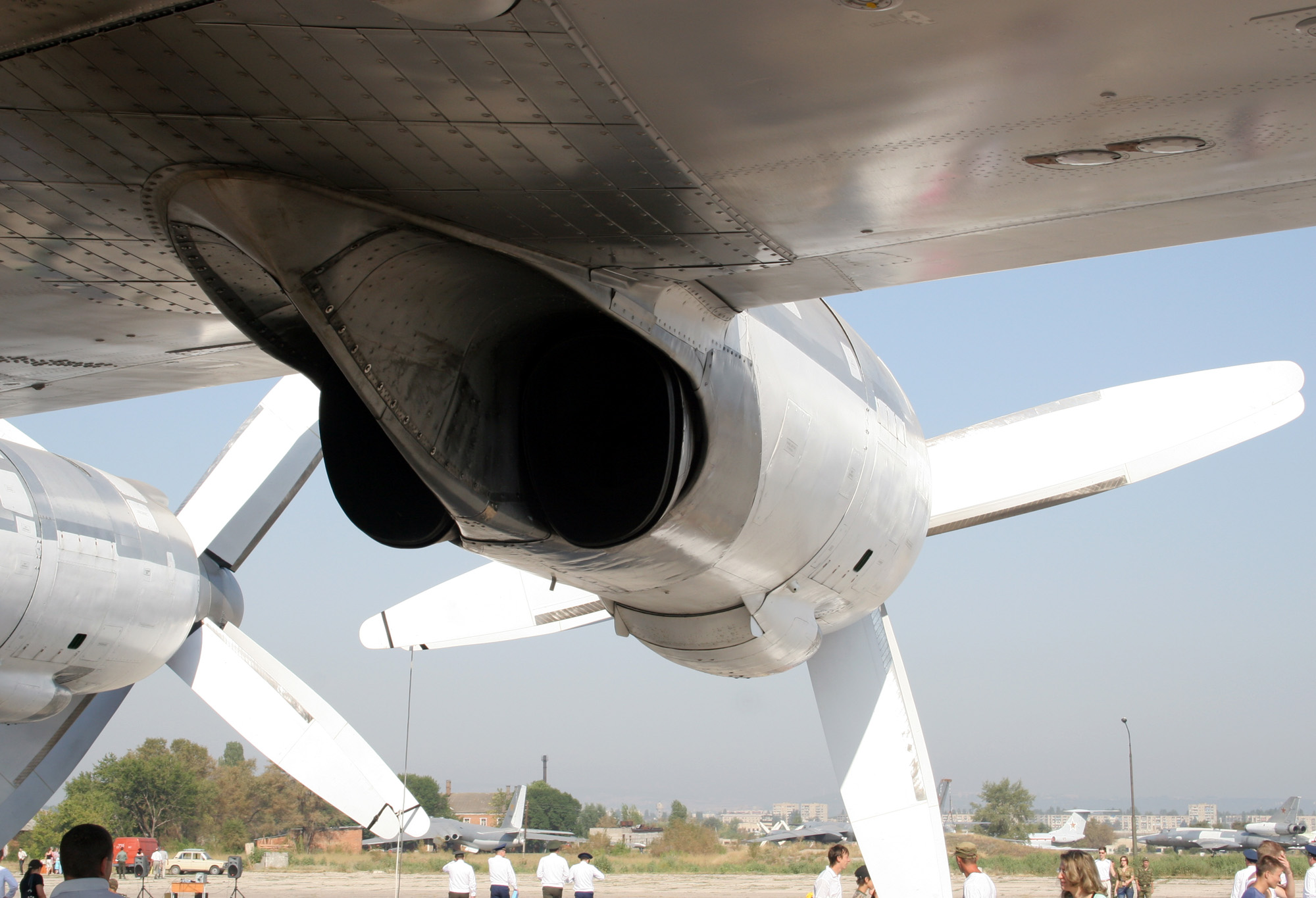 Самолёт Ту-95 бортовой номер 23. Мотогондола правая крайняя